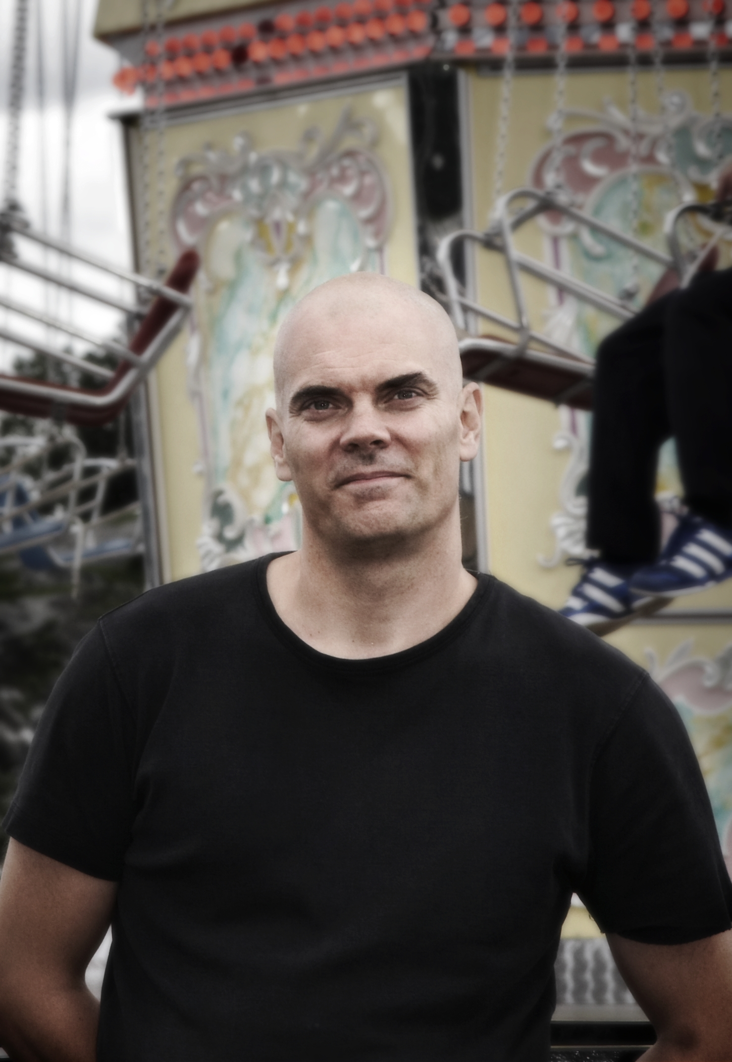 Jörgen Gassilewski, Swedish author